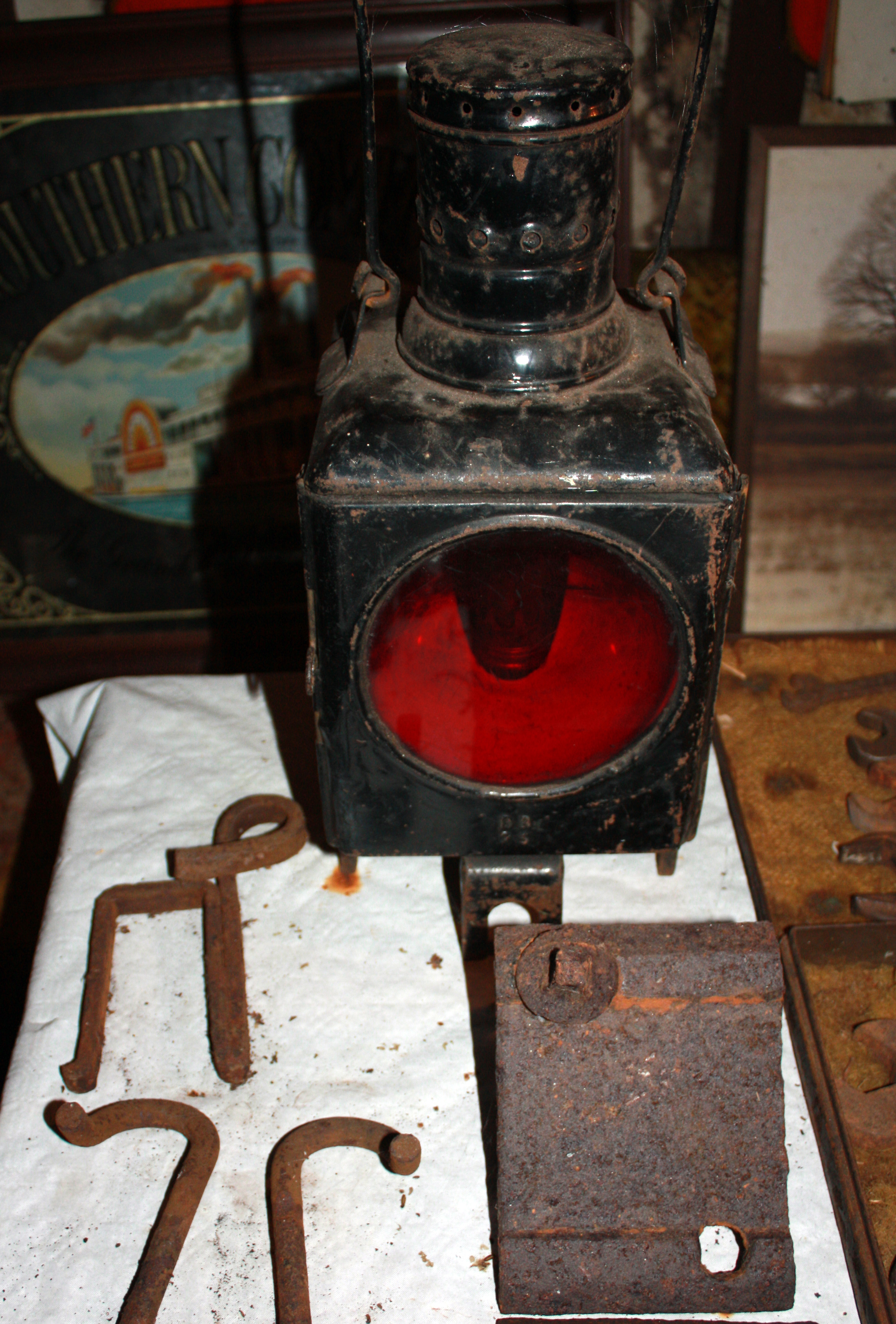 Bawinkel, erhaltene Schlussleuchte der Kleinbahn Lingen-Quakenbrück. Sammlung Hermann Jaske